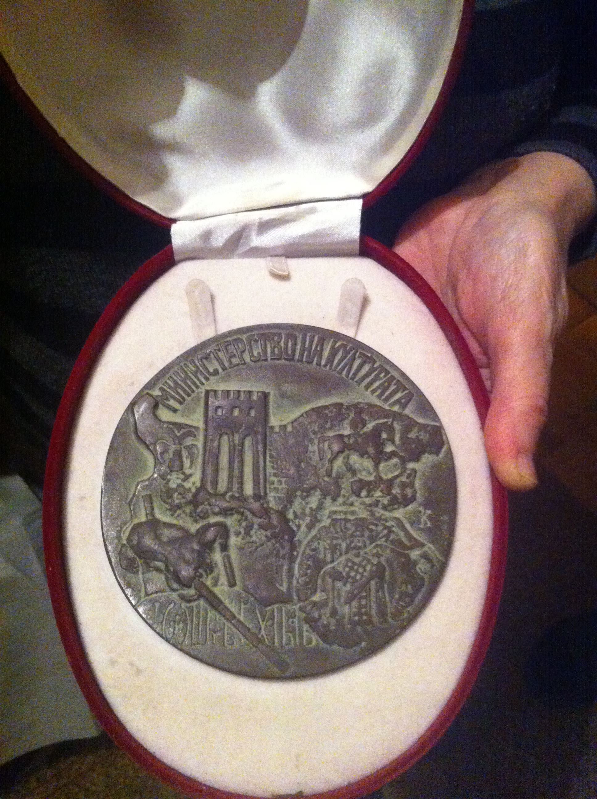 медаль